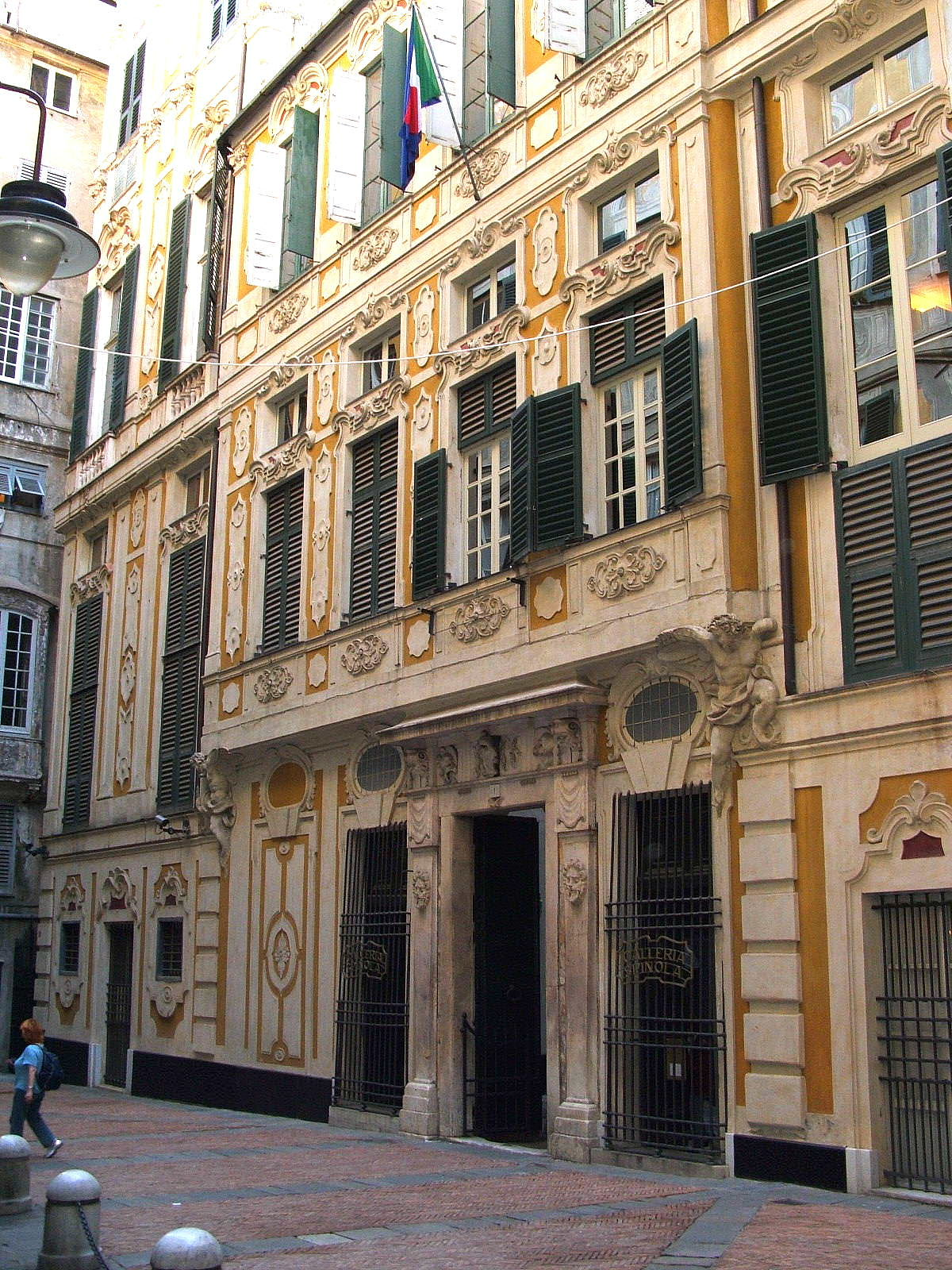 Genova Palazzo Spinola in Pellicceria